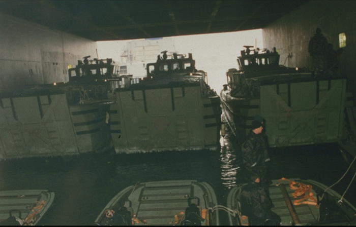 zelfmaak